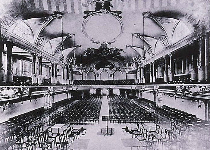 En-tête du papier à lettres du Strassburger Maenner Gesangverein. La salle intérieure du Palais des fêtes (avenue des Vosges) Bibliothèque nationale et universitaire de Strasbourg.